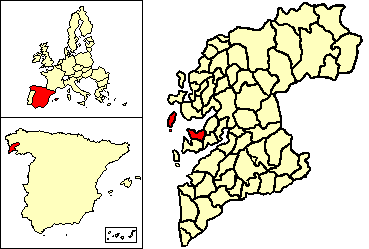 Municipio de Bueu respecto a la provincia de Pontevedra (España)